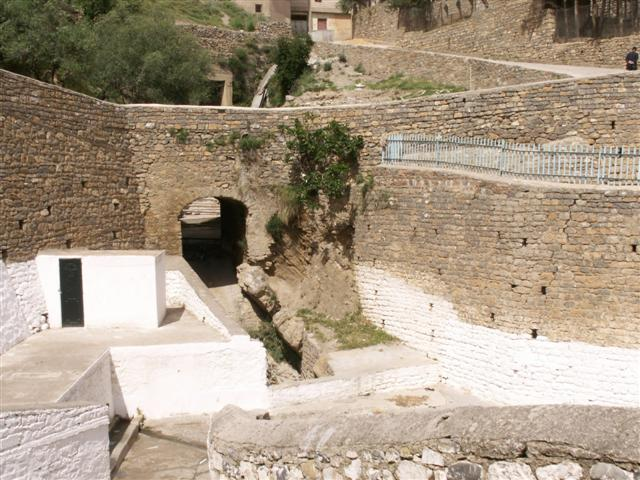 Bordj Zemoura, Algérie